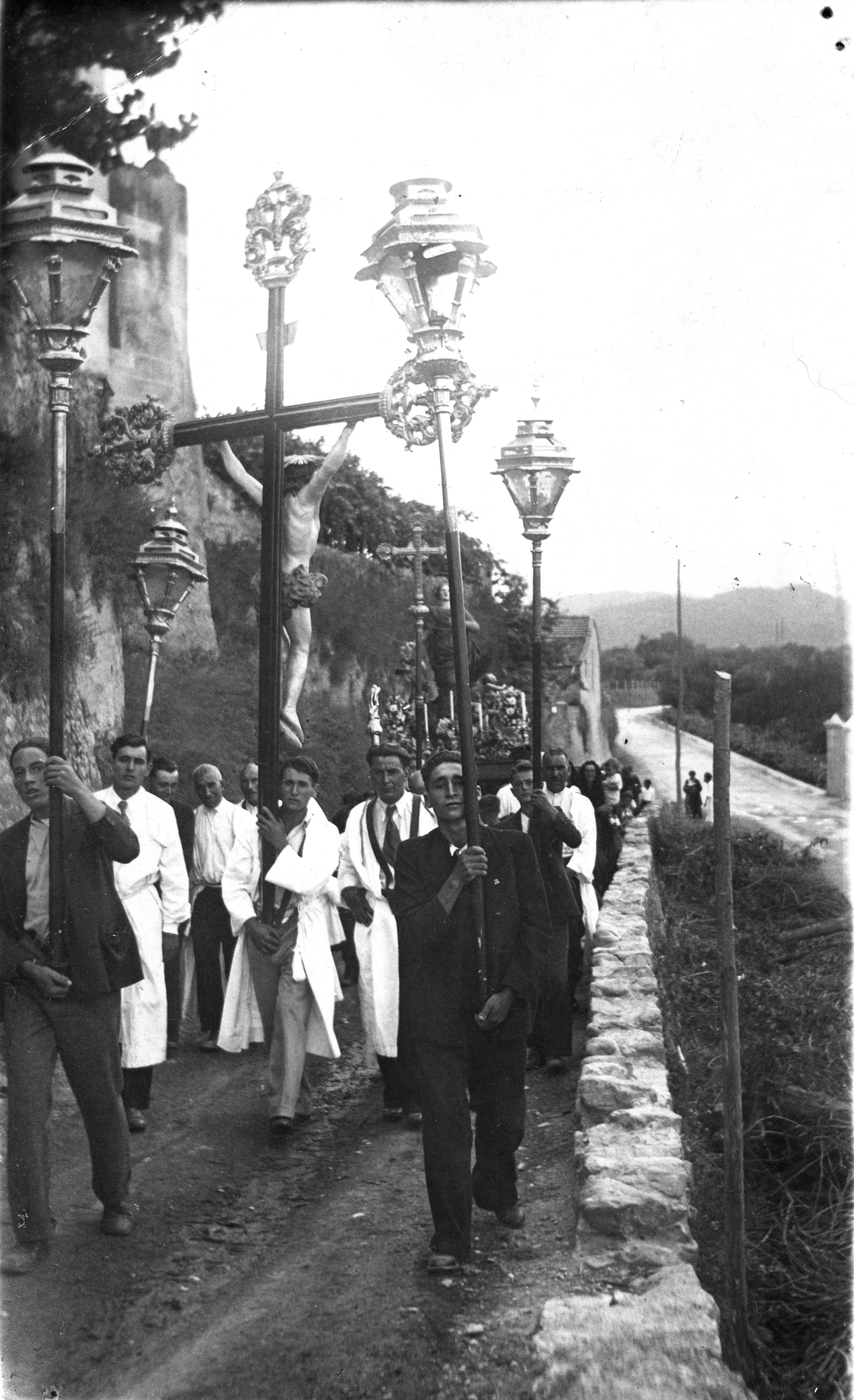 Processione di inizio secolo a Lusignano, con l'antico crocifisso. Sullo sfondo si può vedere l'antica strada provinciale che andava a Villanova